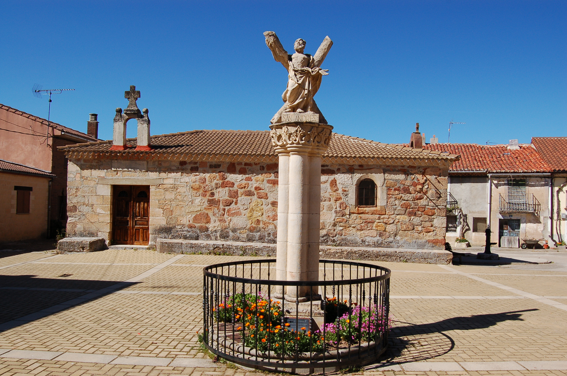 Ermita y escultura de San Andrés en Contreras